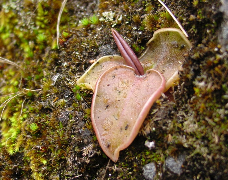 Pinguicula acuminata in situ, Hidalgo, Mexico.